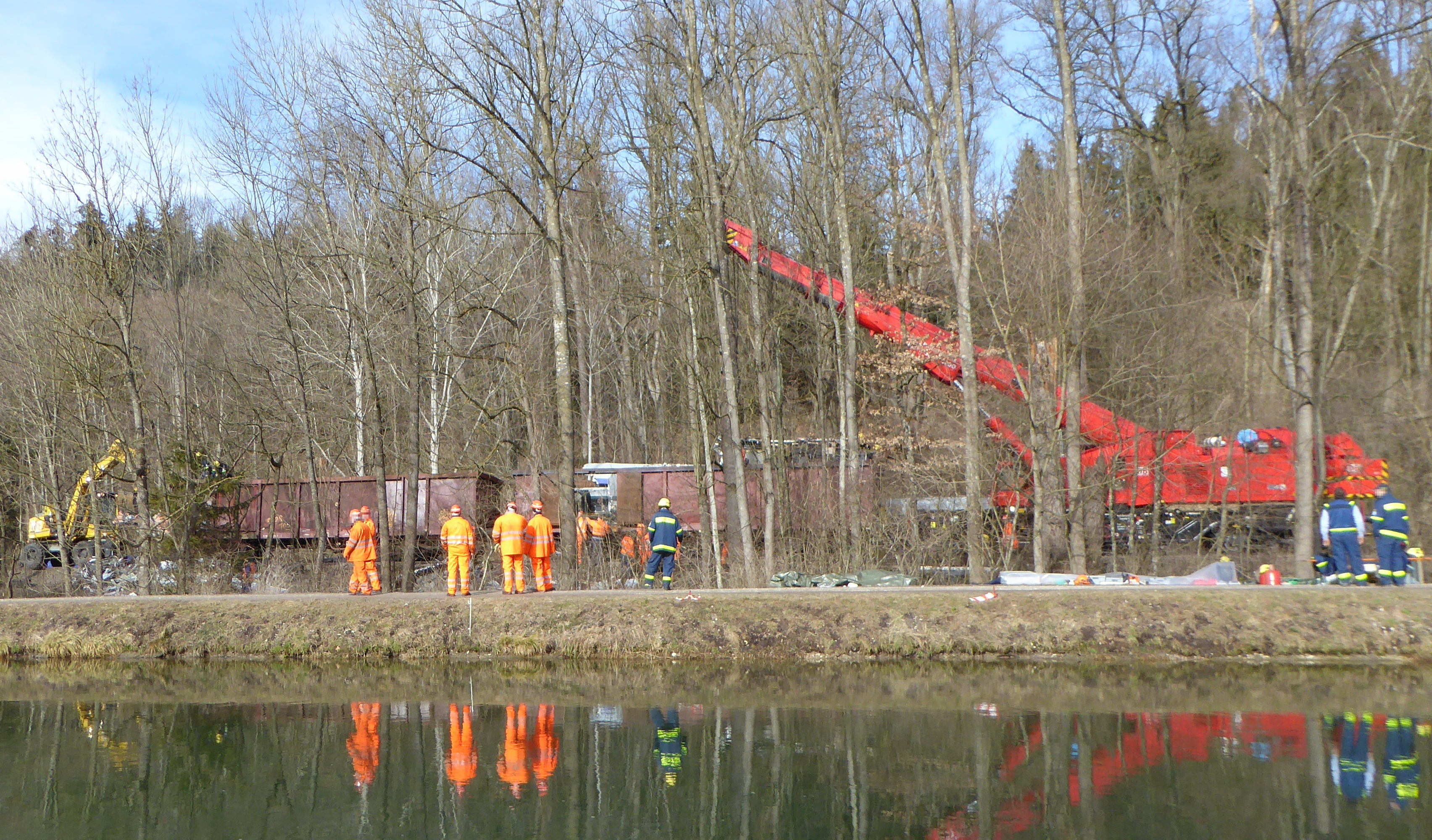 Bergung der Trümmer der am 2016-02-09 verunglückten Meridian-Züge westlich von Kolbermoor.